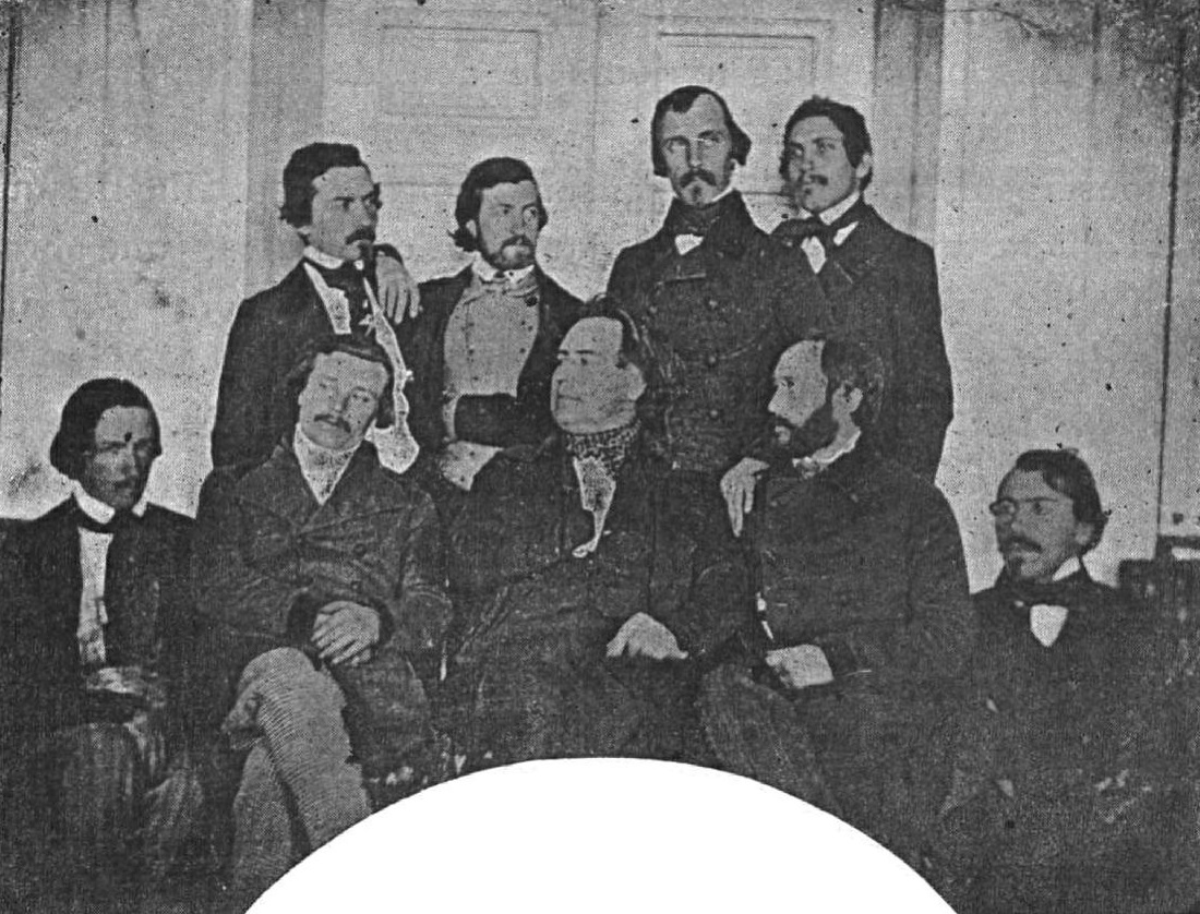 Daguerréotype réalisé entre le 24 et le 26 février 1848, communiqué par Émile Burnouf et représentant les premiers membres de l’École française d'Athènes.